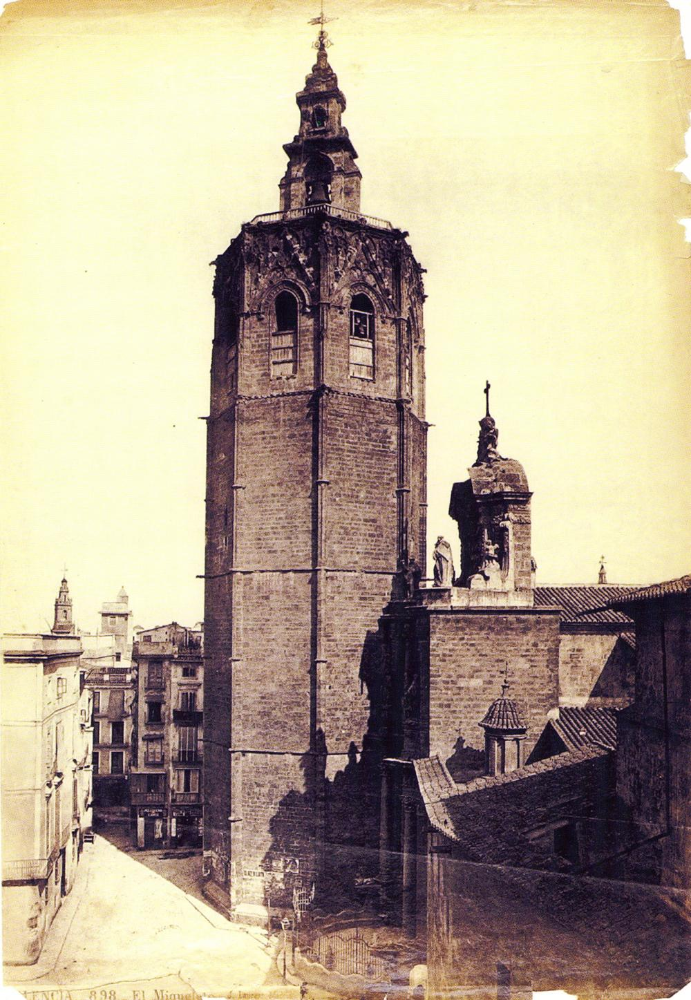 La torre del Miguelete, o Micalet, de Valencia (España), en el año 1870. Fotografía comercializada por J. Laurent, pero realizada por Julio Ainaud (que fotografió todo el levante español). Ver libro: José Huguet, Las fotografías valencianas de J. Laurent, Valencia, Ayuntamiento de Valencia, 2003. ISBN 84-8484-069-7